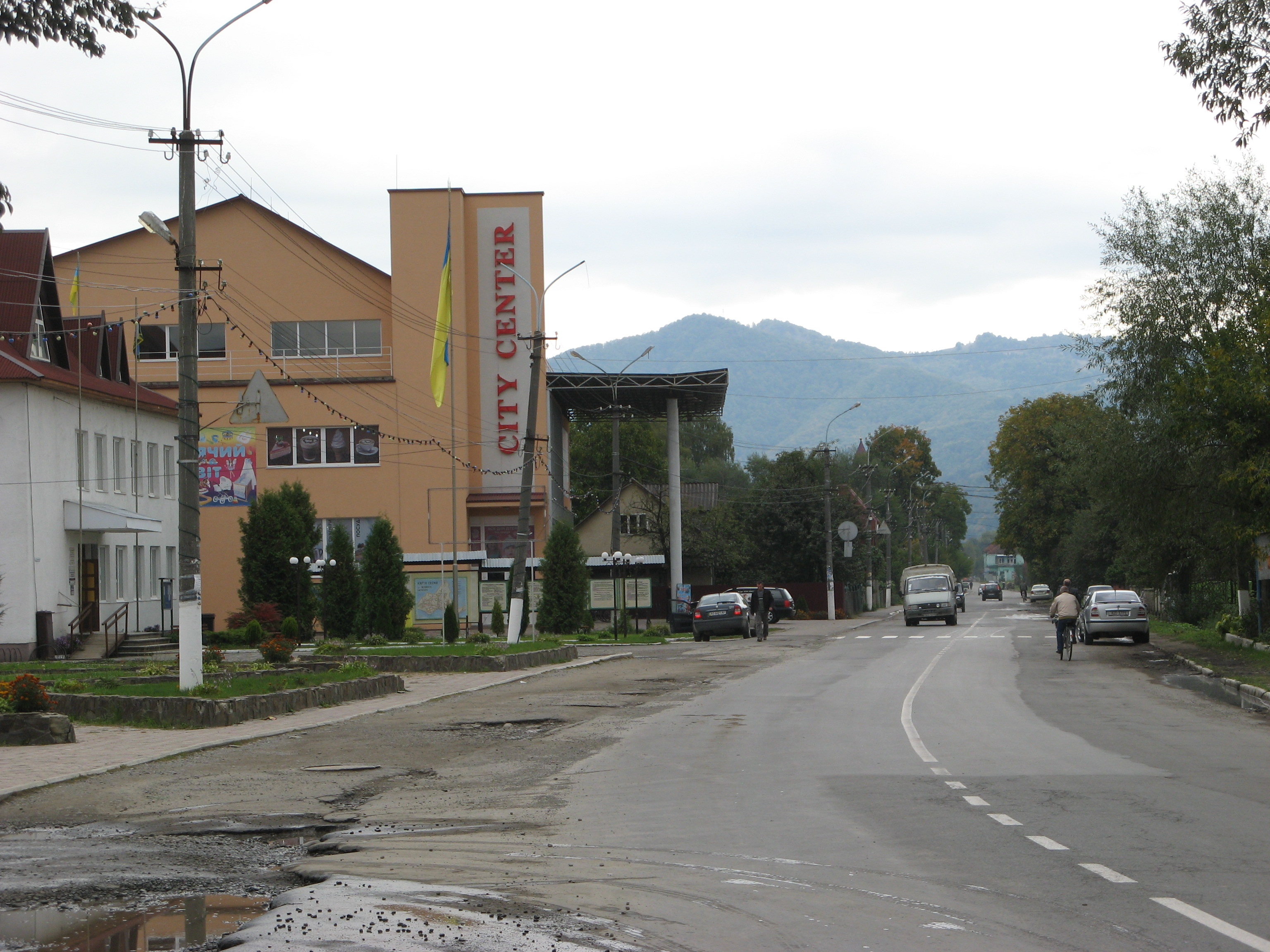 смт Великий Бичків (Закарпатська обл.)